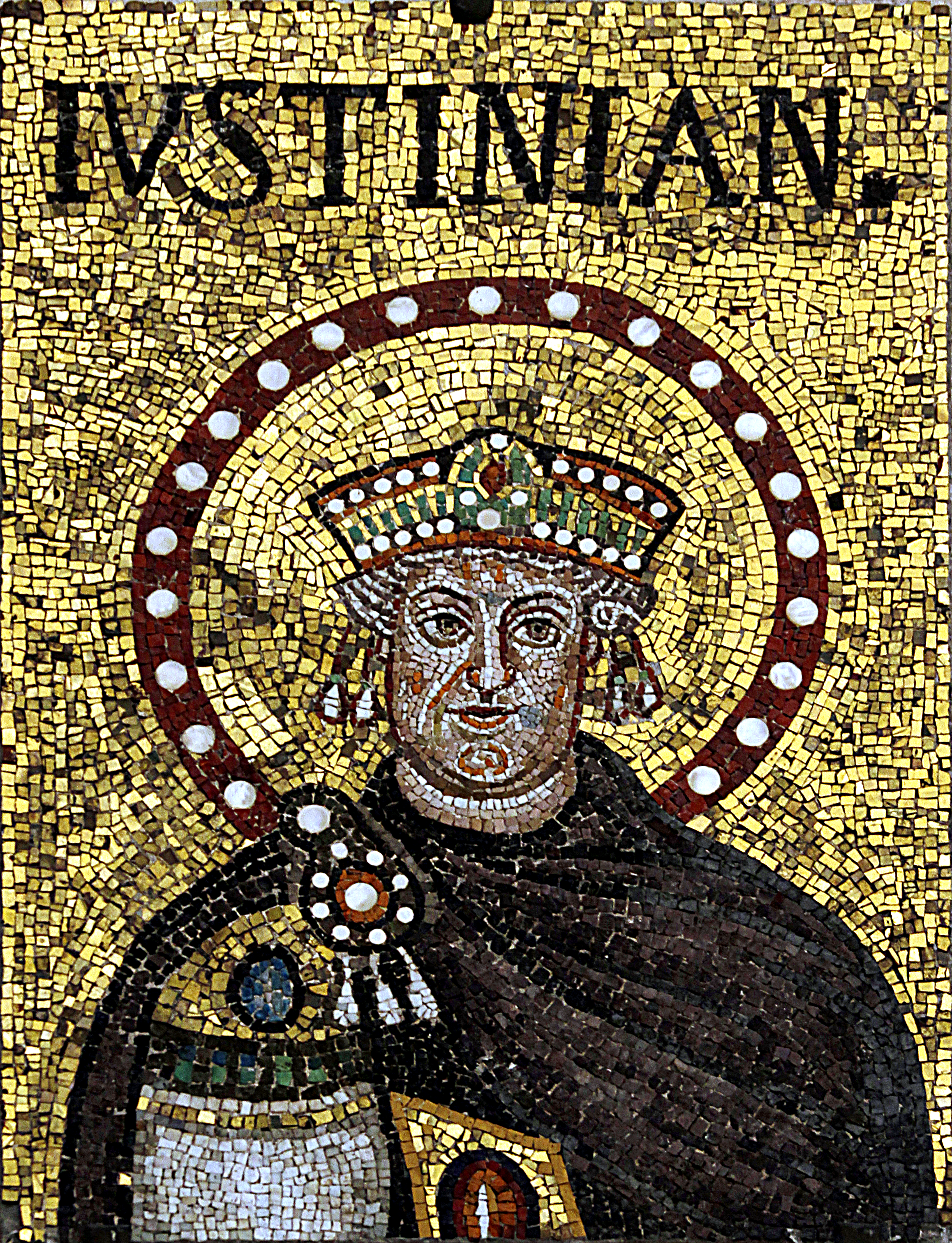 Sant'Apoilinare Nuovo - Ravenna